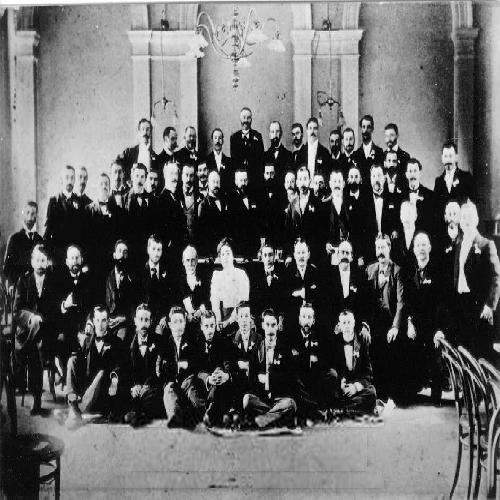 אנגליה הועידה הראשונה של הפדרציה הציונית באנגליה ( 1899) בן המשתתפים : יוסף קאואן , דוד וולפסון , סר פרנסיס מונטיפיורי , ל.י. גרינברג , דב האז , הרברט בנטוויץ , מ. גאסטר , תאודור הרצל .